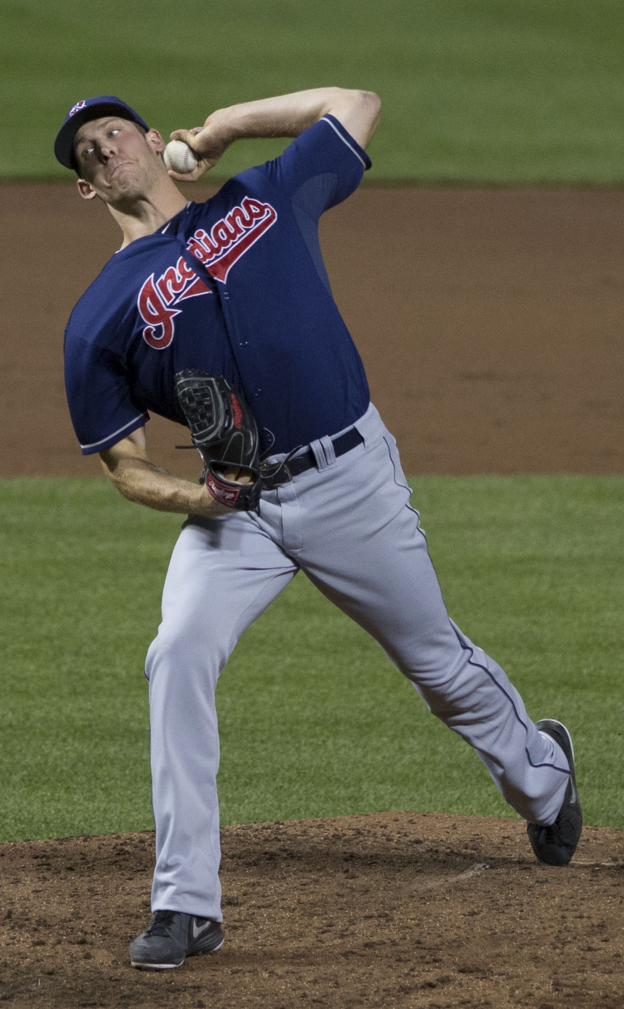 Nick Hagadone